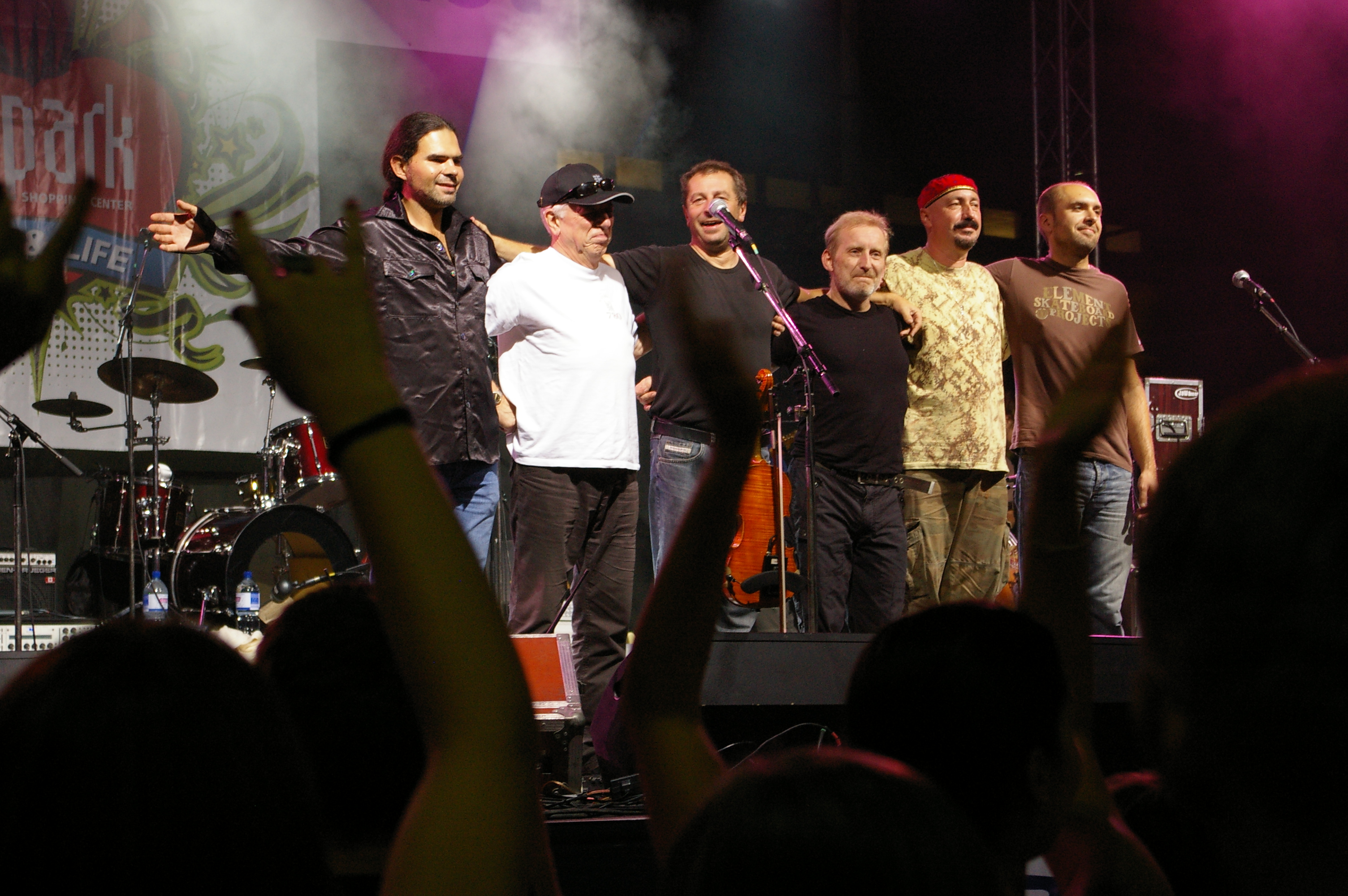 Čechomor v Bratislave